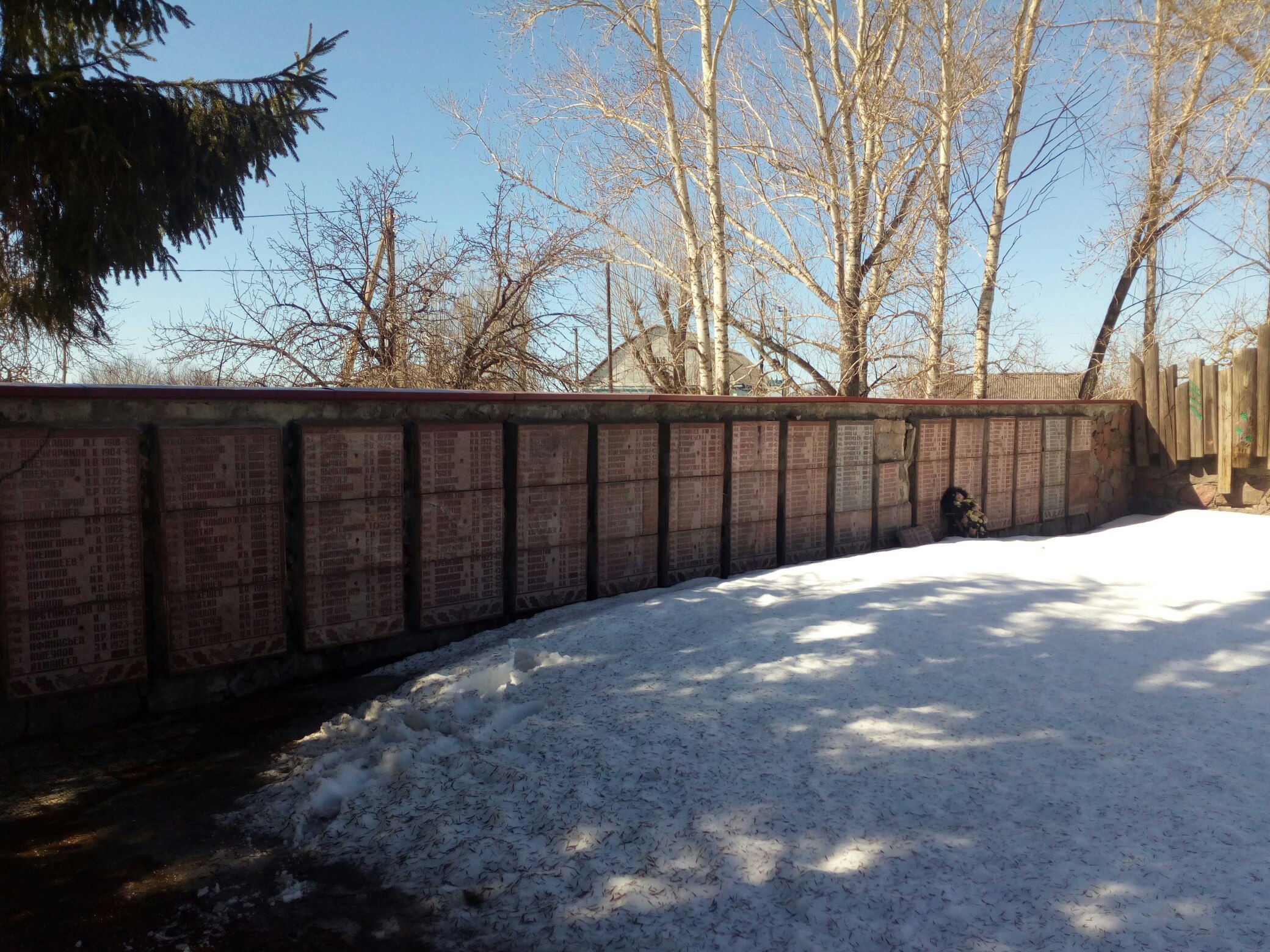 Мемориал «Память» который воздвигнут на месте братской могилы № 305 и посвящён освободителям села от вермахта в ВОВ. Село Кочетовка, Хохольский район, Воронежская область, Россия.